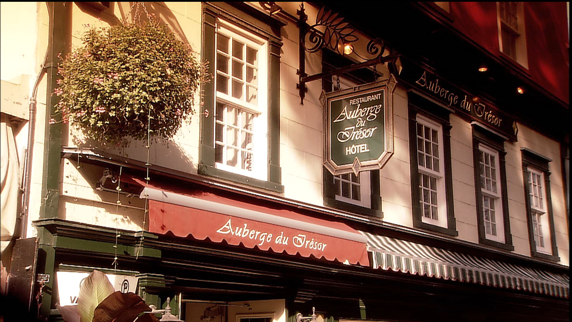 Auberge du Trésor de la ville de Québec / Auberge du Trésor in Quebec city, Québec (Canada)